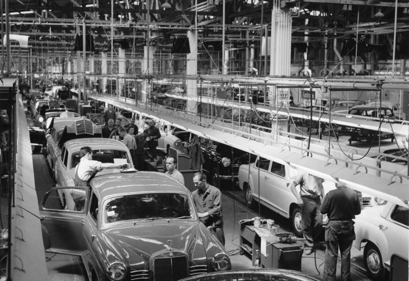 Daimler-Benz A.G. Werk Sindelfingen End-Fließband der Wagen